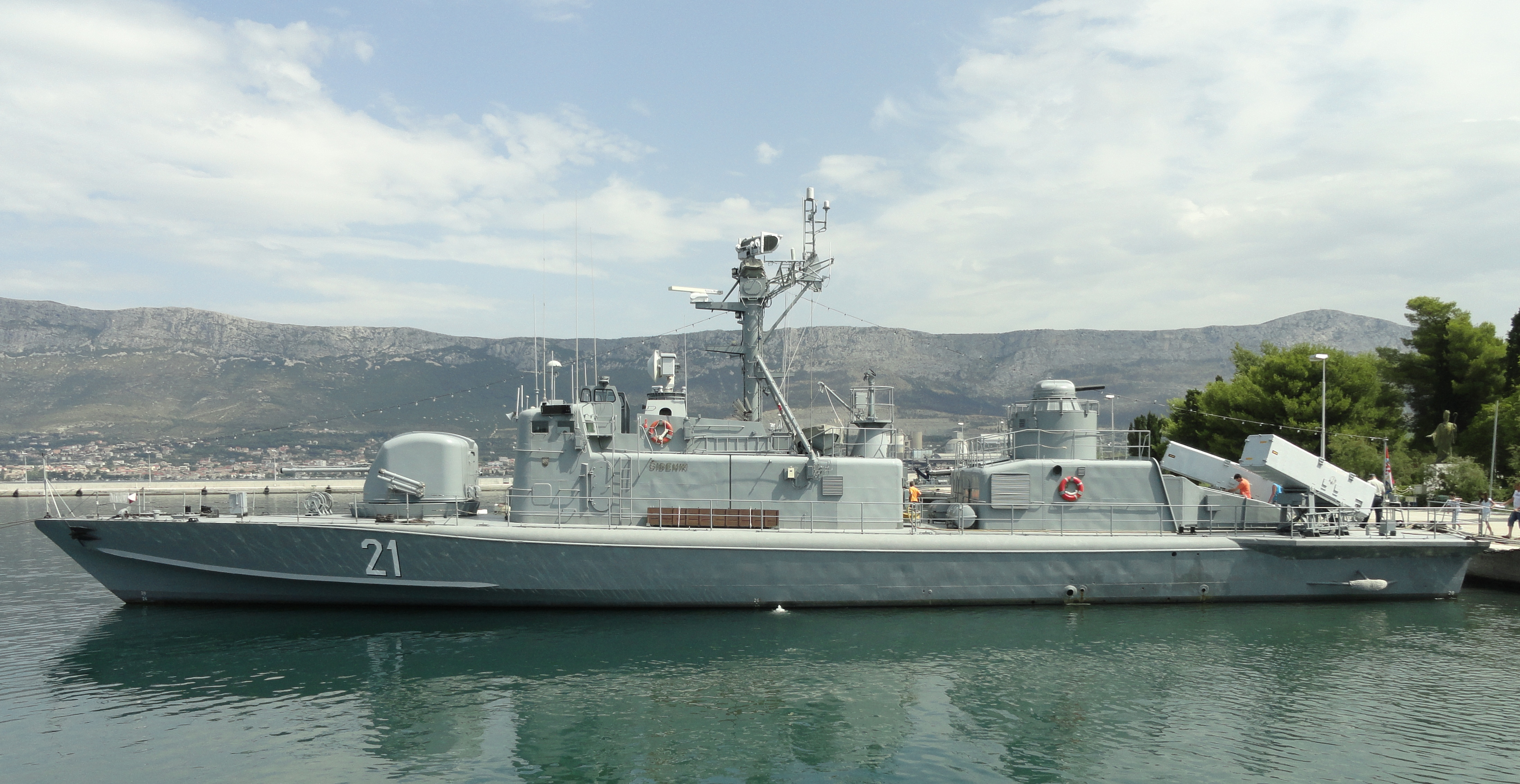 RTOP-21 Šibenik u Lori.